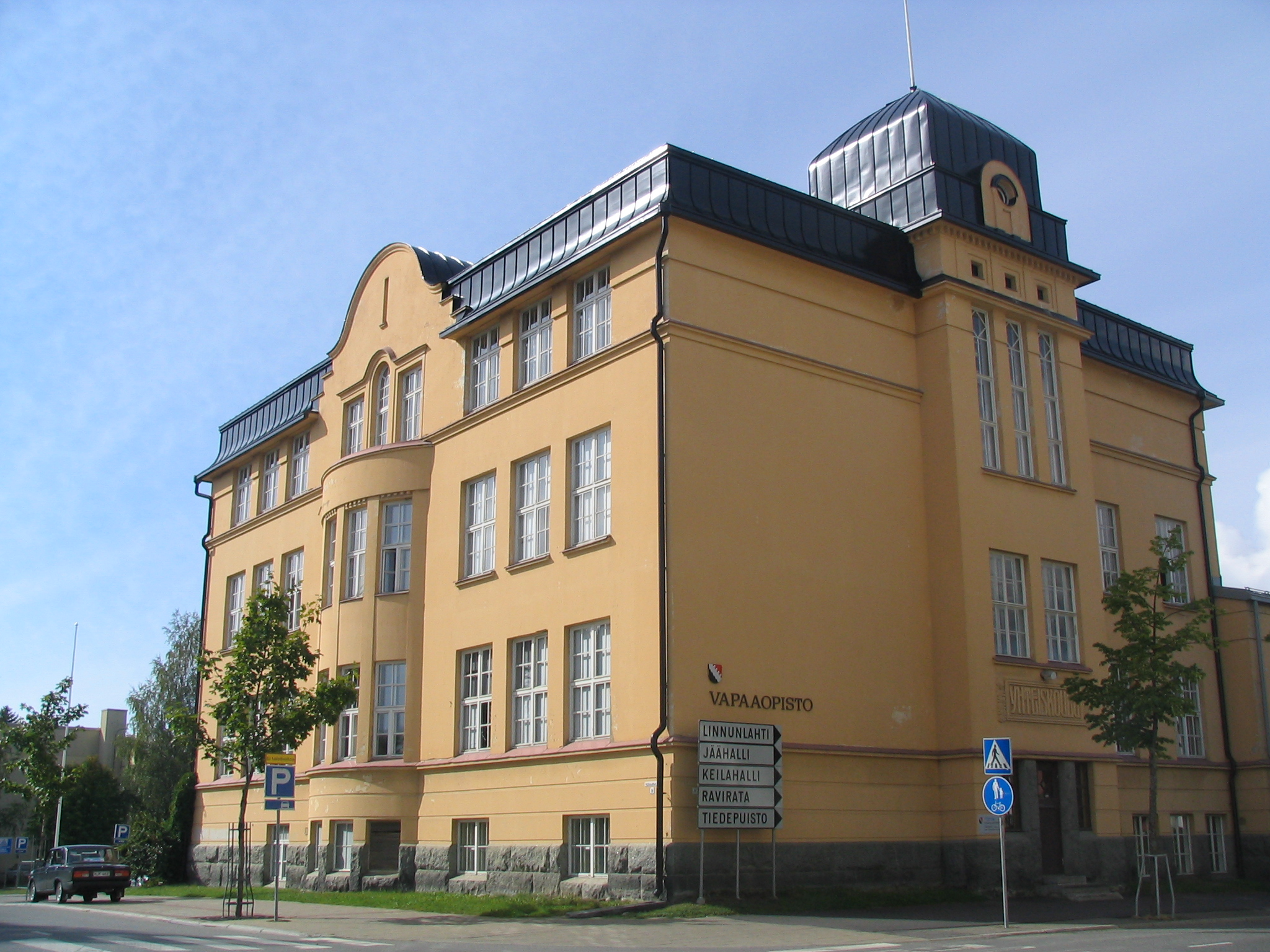 Joensuun vapaaopistontalo, jossa nykyisin toimii kansalaisopisto. Osoite: Papinkatu 3, Joensuu Open college of Joensuu.